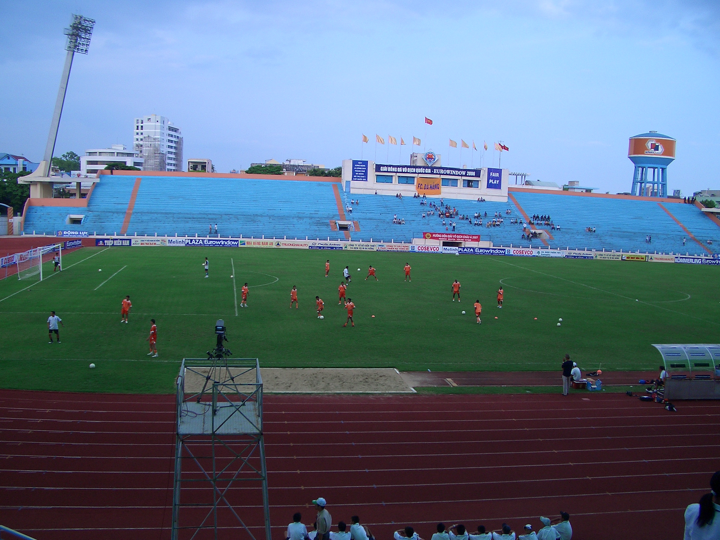 Chi Lăng stadium, Da Nang, Vietnam.